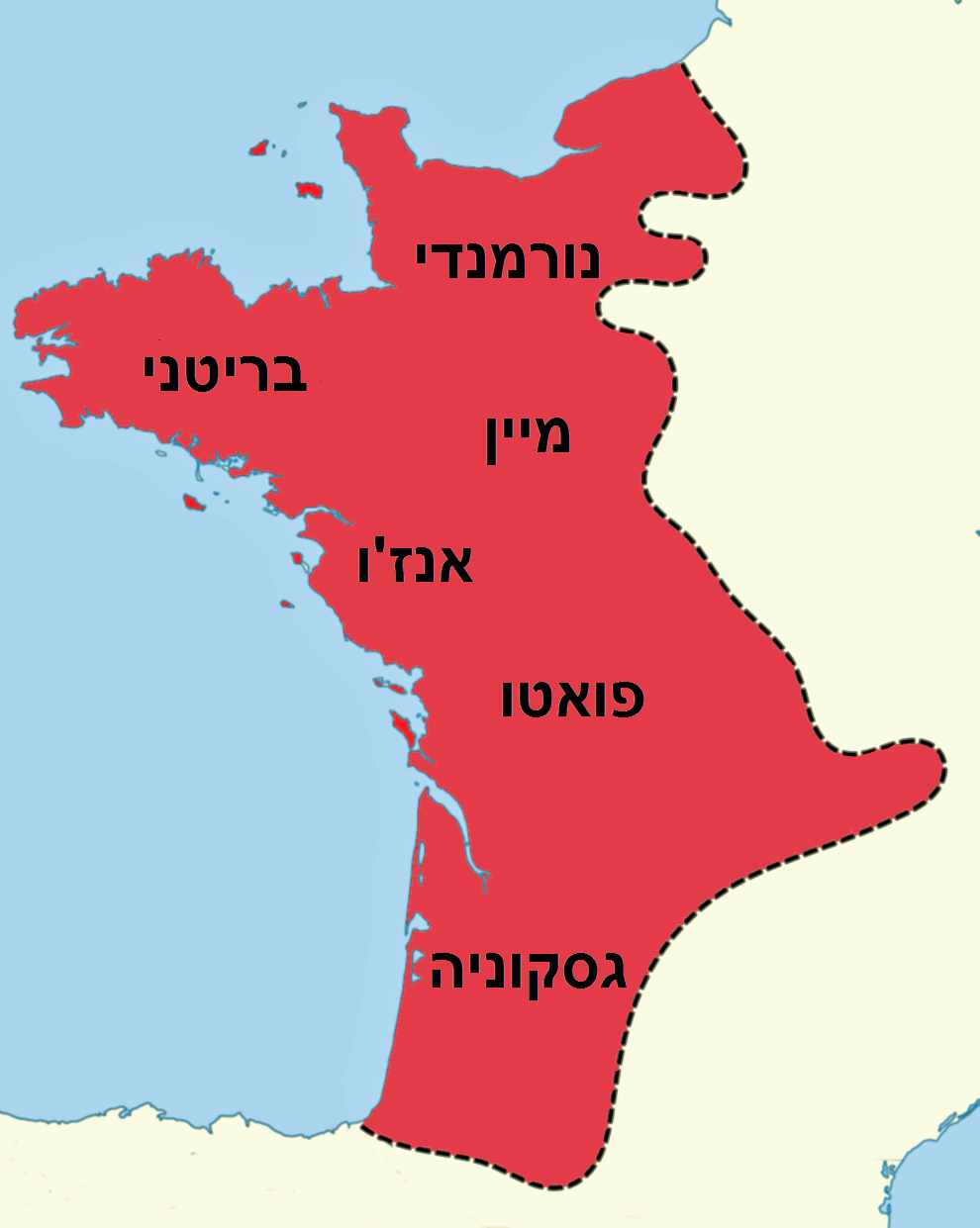 תרגום: File:Angevin empire in France c. 1200 (simplified).png